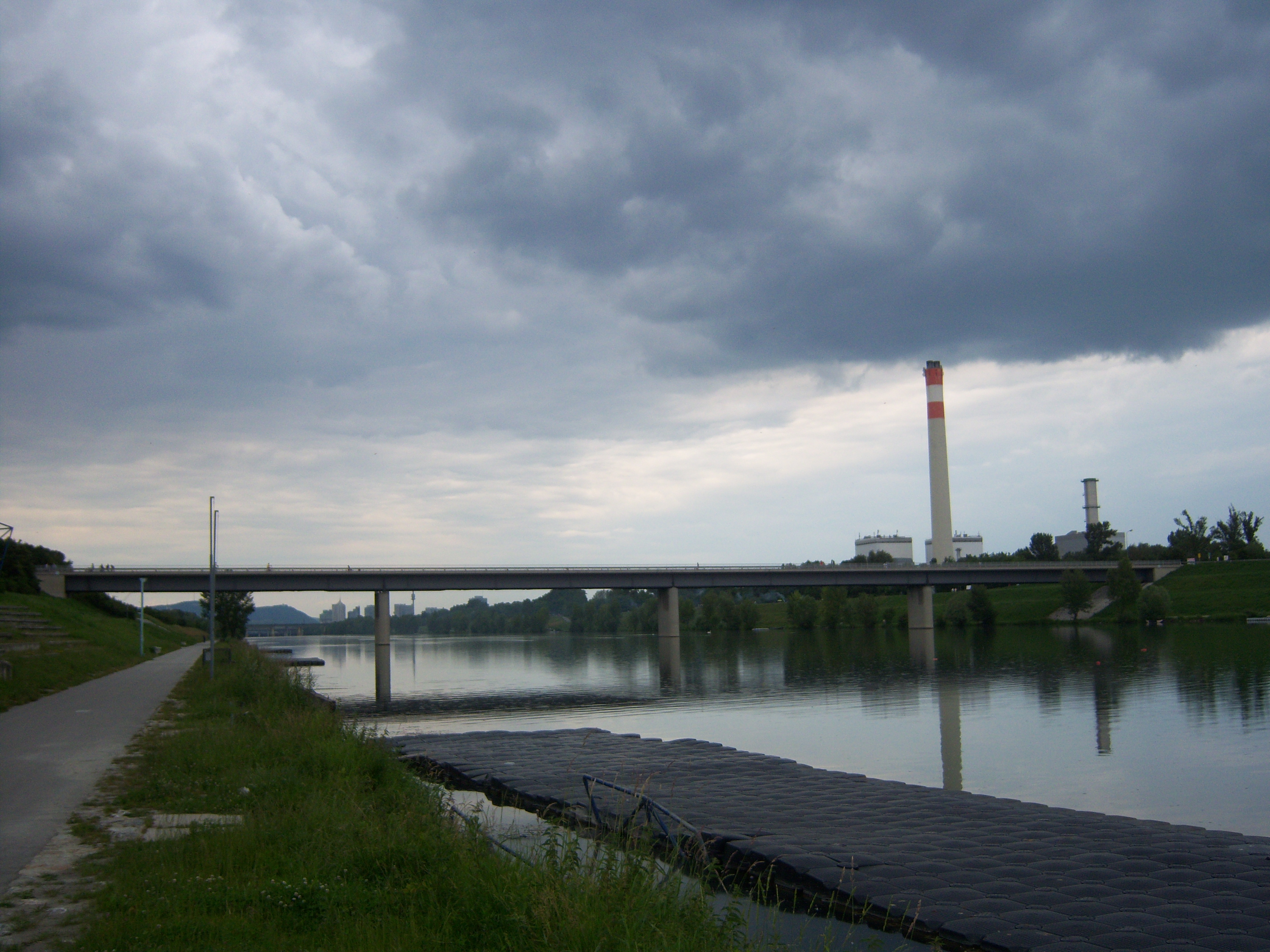 Steinspornbrücke